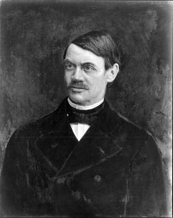 Prof. Robert Römer (Öl auf Leinwand, 73 cm × 59 cm; Tübinger Professorengalerie)